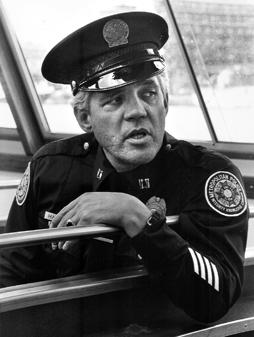 G.W. Bailey